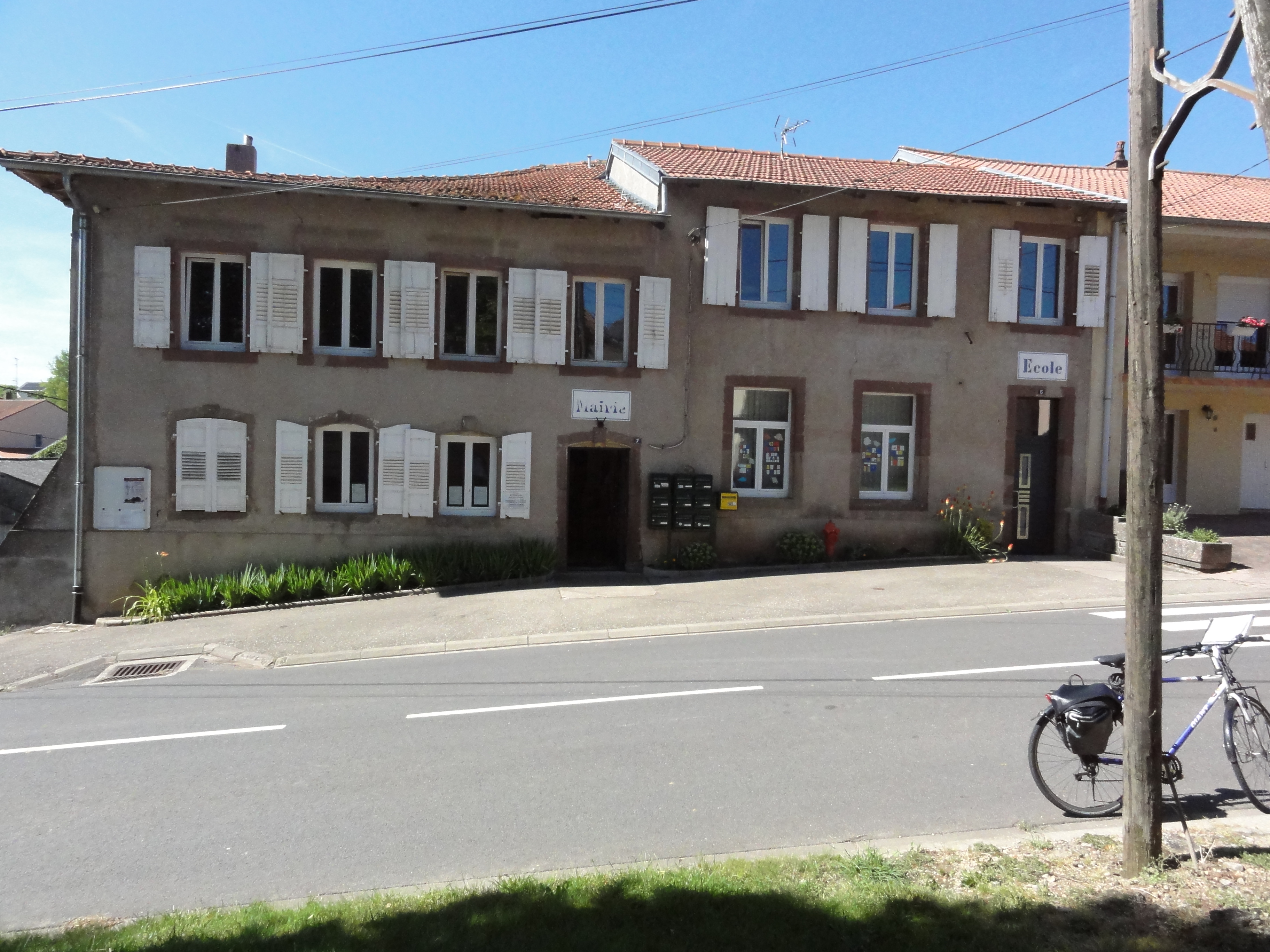 Bassing (Moselle) mairie - école